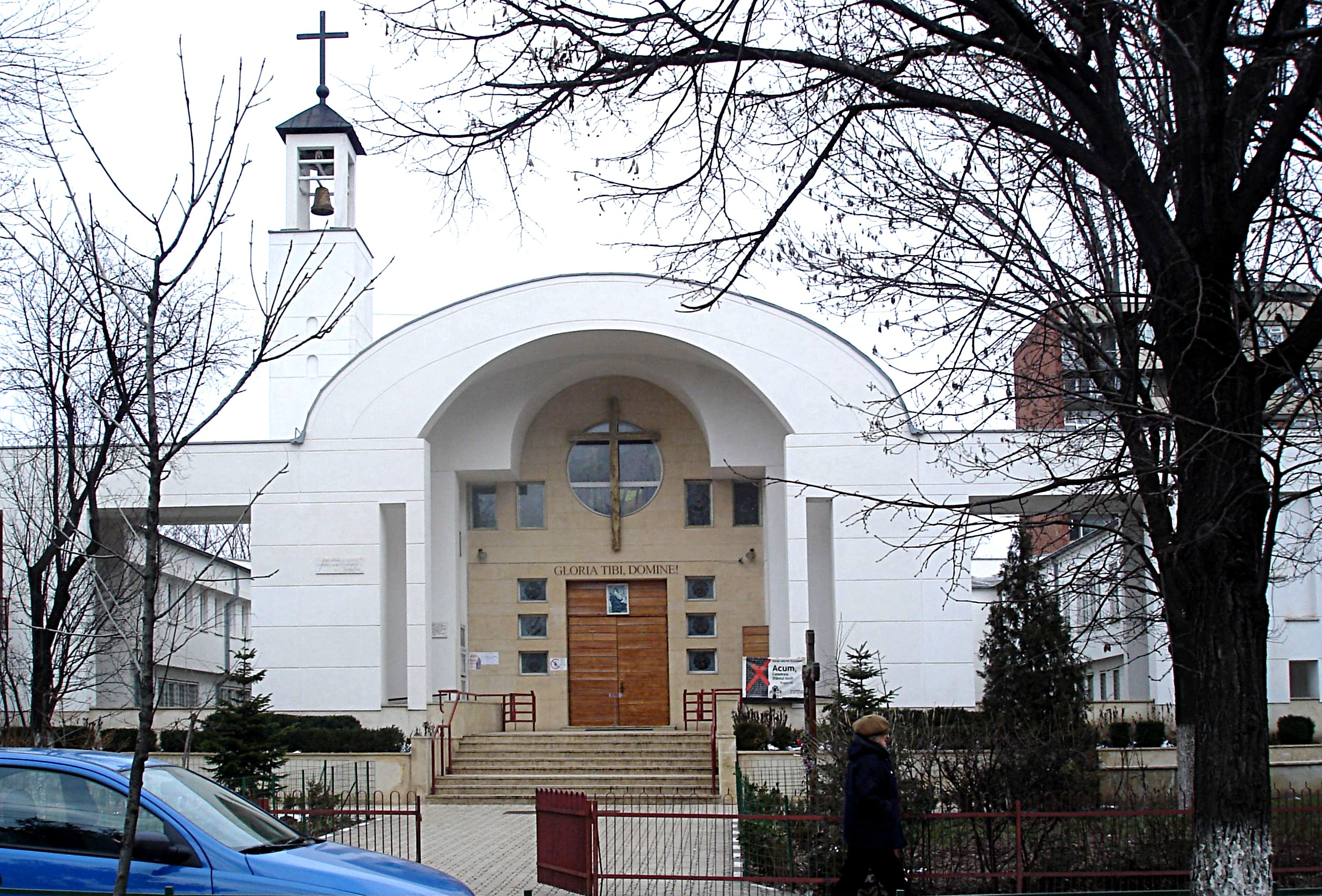 Biserica Catolică din Drumul Taberei, Bucureşti